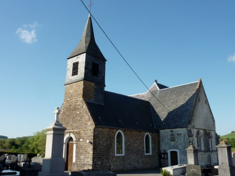 Autre face de l'église de Brunembert